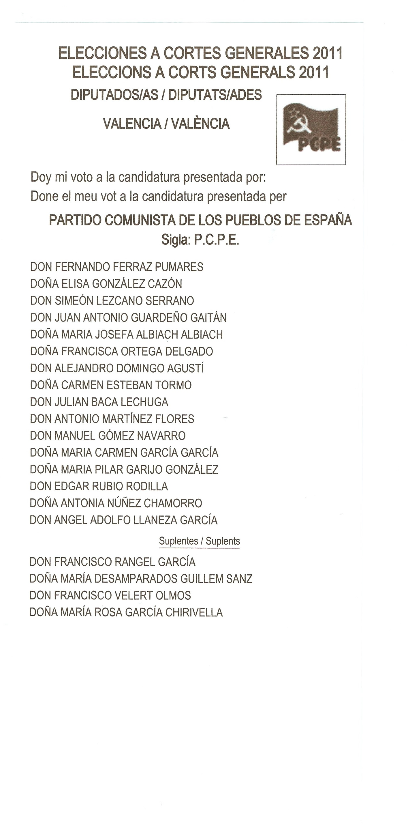 Papeleta del Partido Comunista de los Pueblos de España por Valencia al Congreso en 2011.